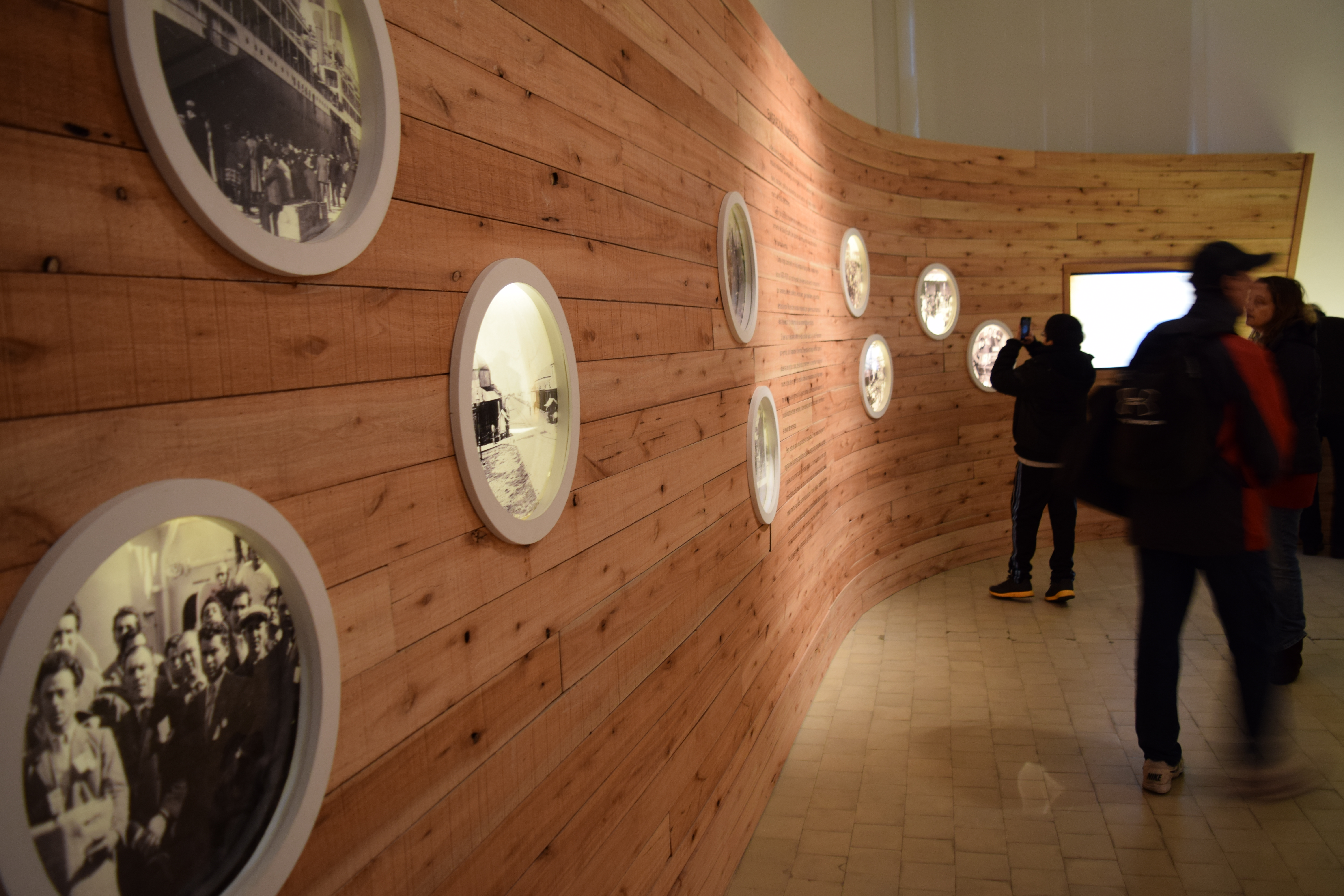 Editatón en el Hotel del Inmigrante, organizado por Wikimedia Argentina y MUNTREF.